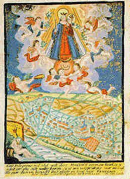 Wallfahrtsbildchen mit Darstellung des frühesten Ortsplans von Kevelaer aus der Vogelschau. Kolorierter Kupferstich auf Pergament.